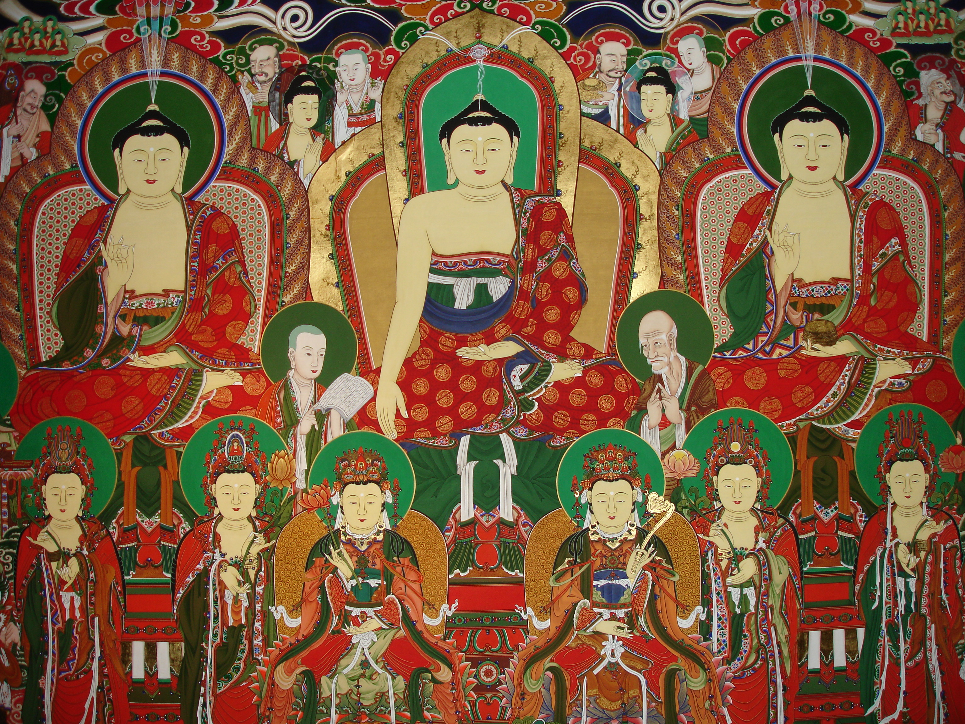 덕수궁 불교 탱화, #WLM2016, #WLMKorea